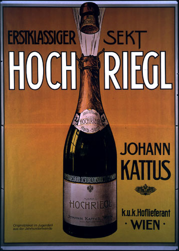 Werbeplakat Hochriegl Sekt von Kattus.